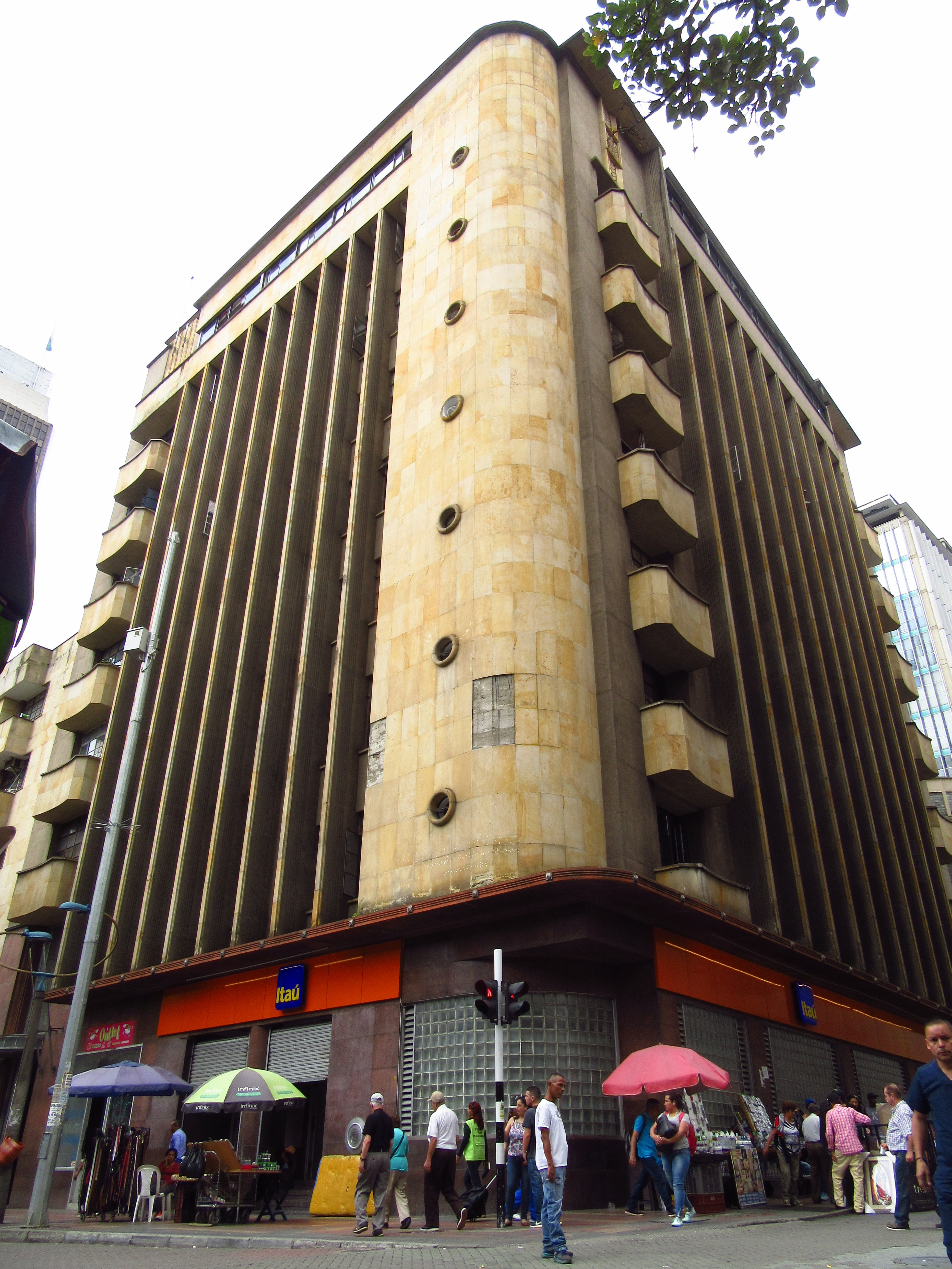 Edificio Bemogú - Grancolombia en la esquina nororiental del cruce de la Carrera Junín con la Calle Colombia.